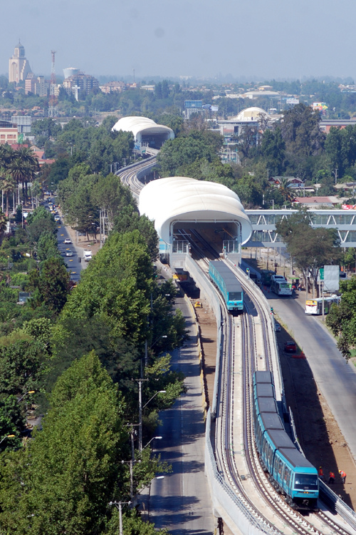 Vista de la Línea 5 del Metro de Santiago sobre Maipú.